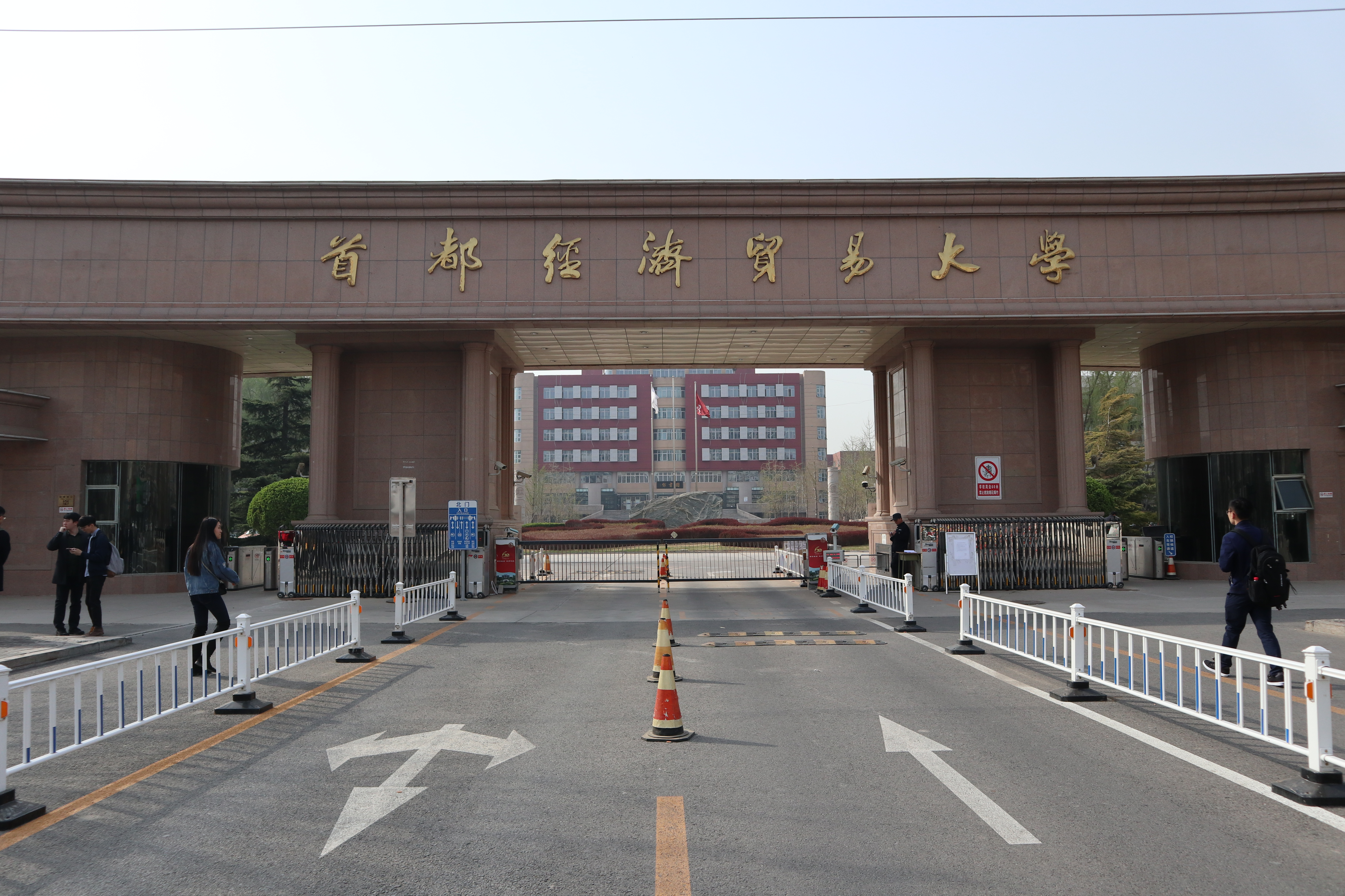 首都经济贸易大学正门，摄于2018年3月